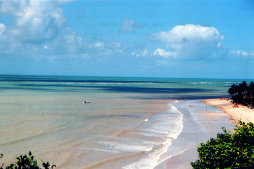 Ponta do Seixas, João Pessoa, Paraíba, Brasil, Onde o Sol nasce primeiro!!!